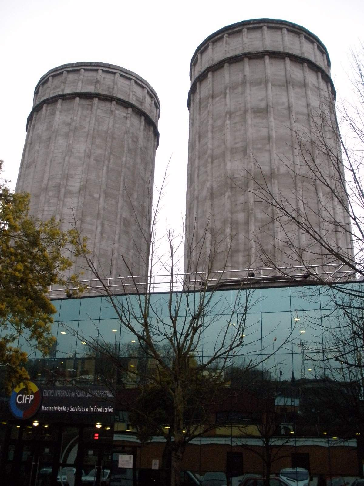 La Felguera de Langreo (Asturias)